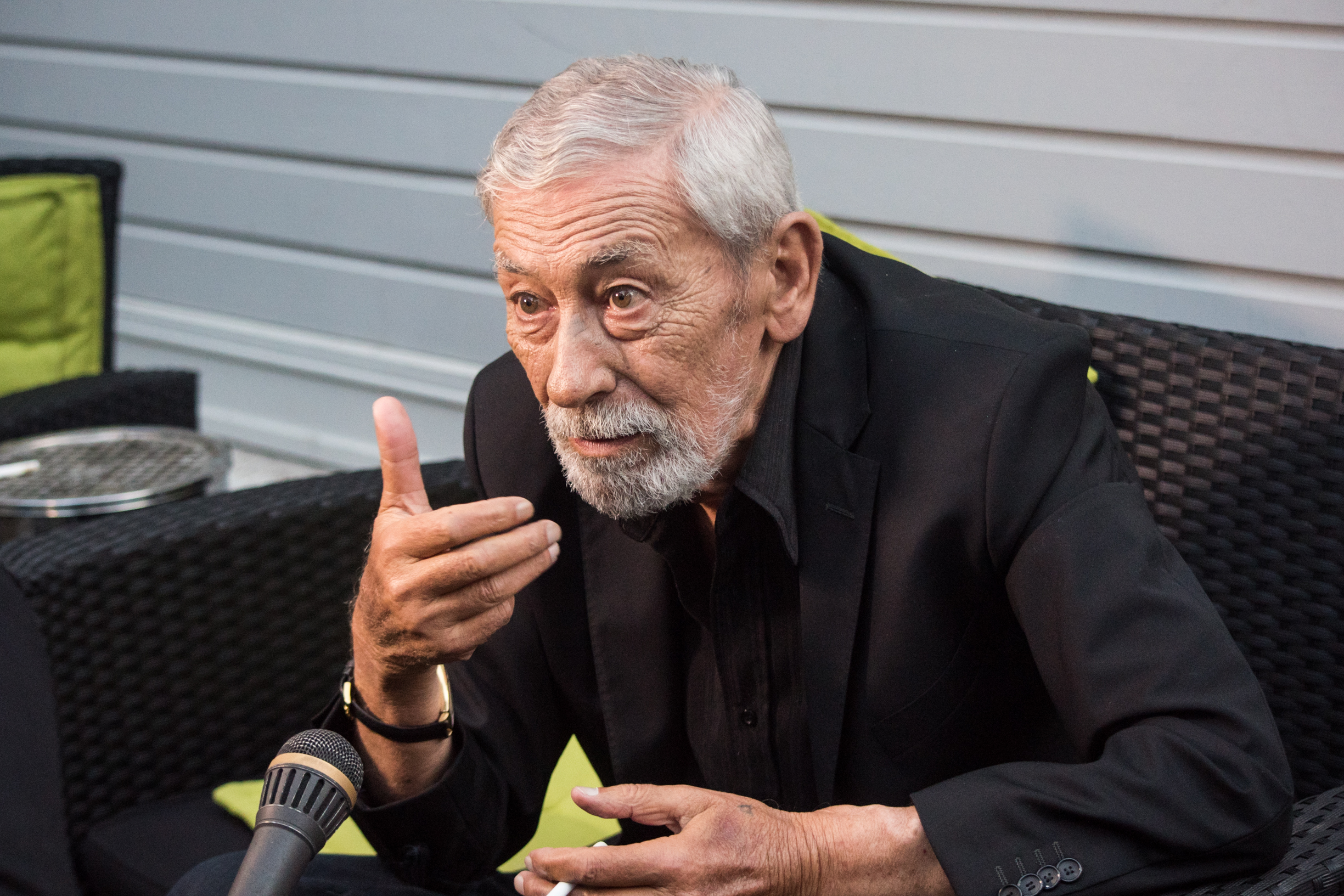 Вахтанг Кикабидзе на фестивале «Лайма. Рандеву. Юрмала 2017»